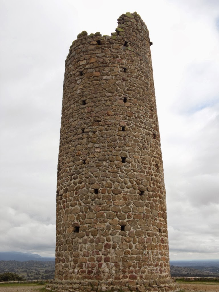 Aspecto exterior de la Atalaya